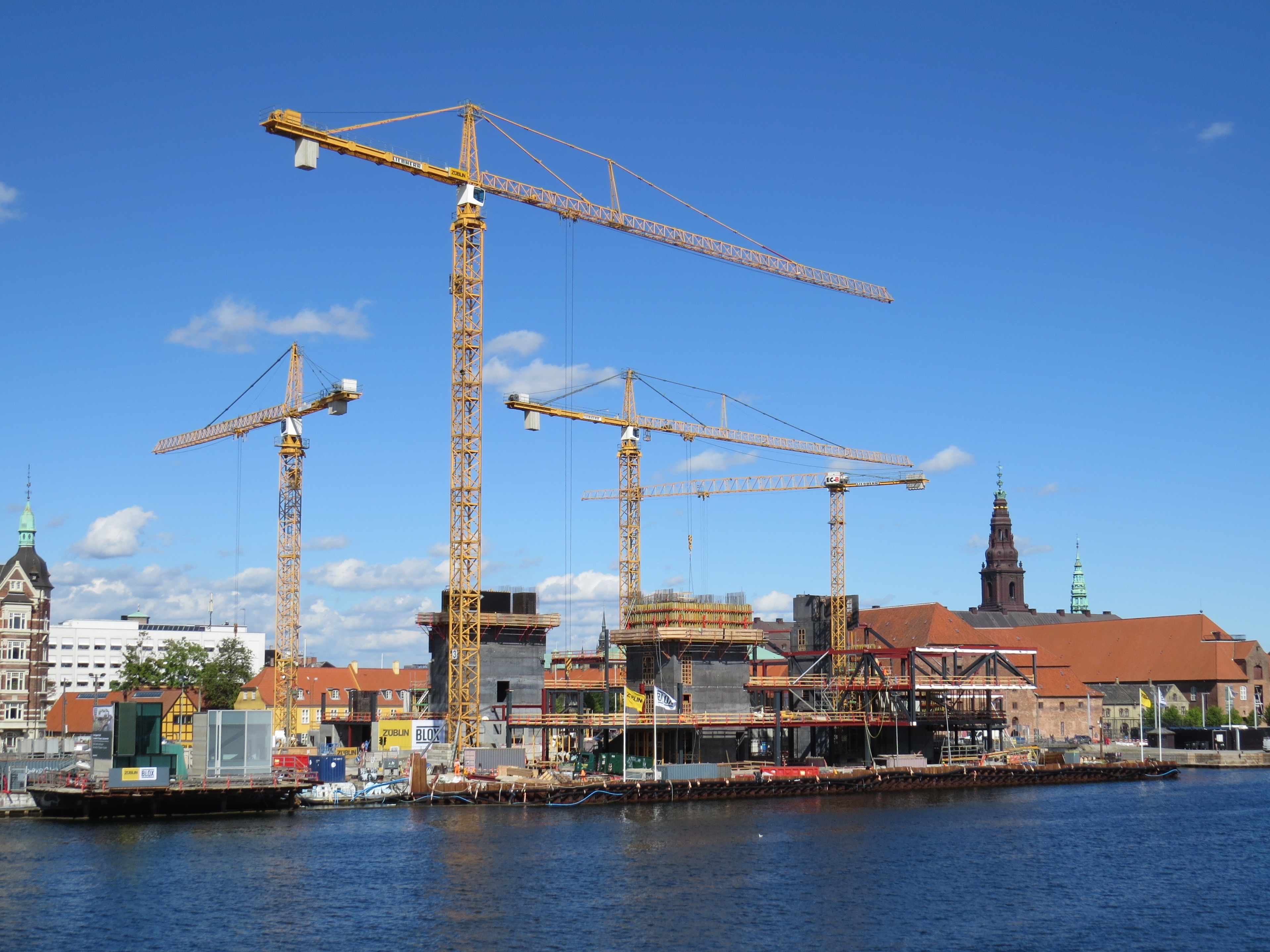 Opførelse af Blox, Christians Brygge, København